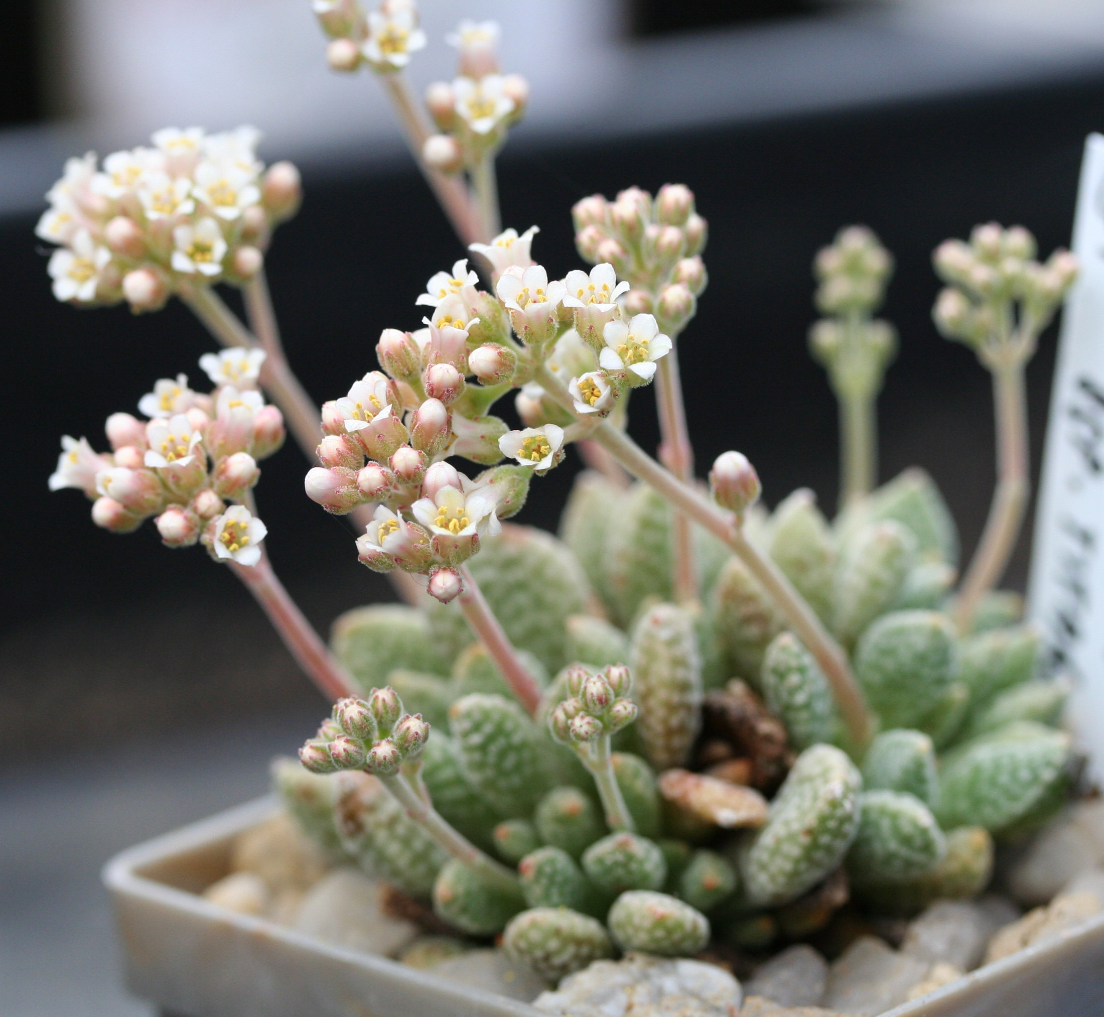 Crassula ausensis ssp. titanopsis in Kultur